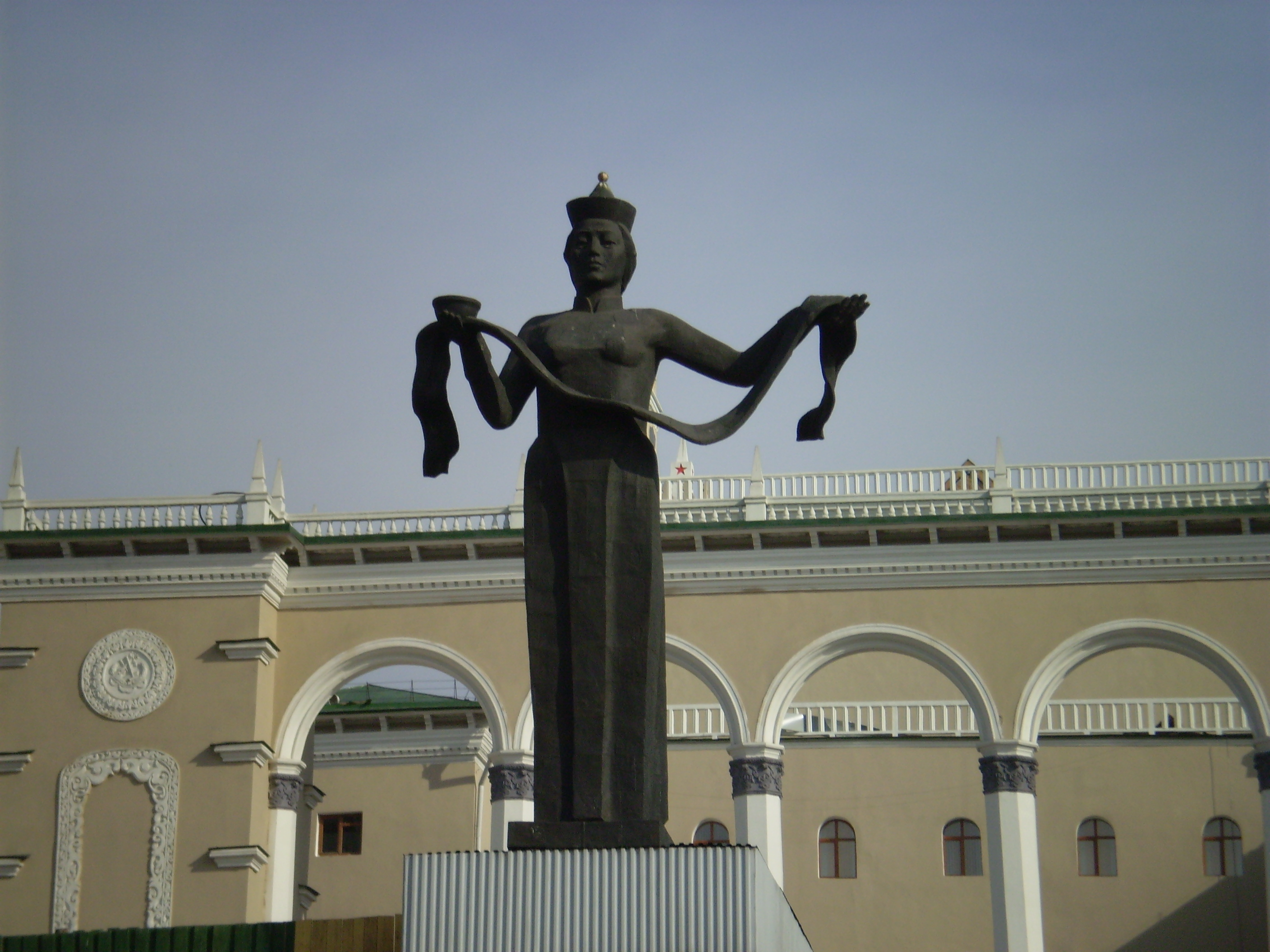 Мать Бурятия. Скульптор Александр Миронов (Иркутск)